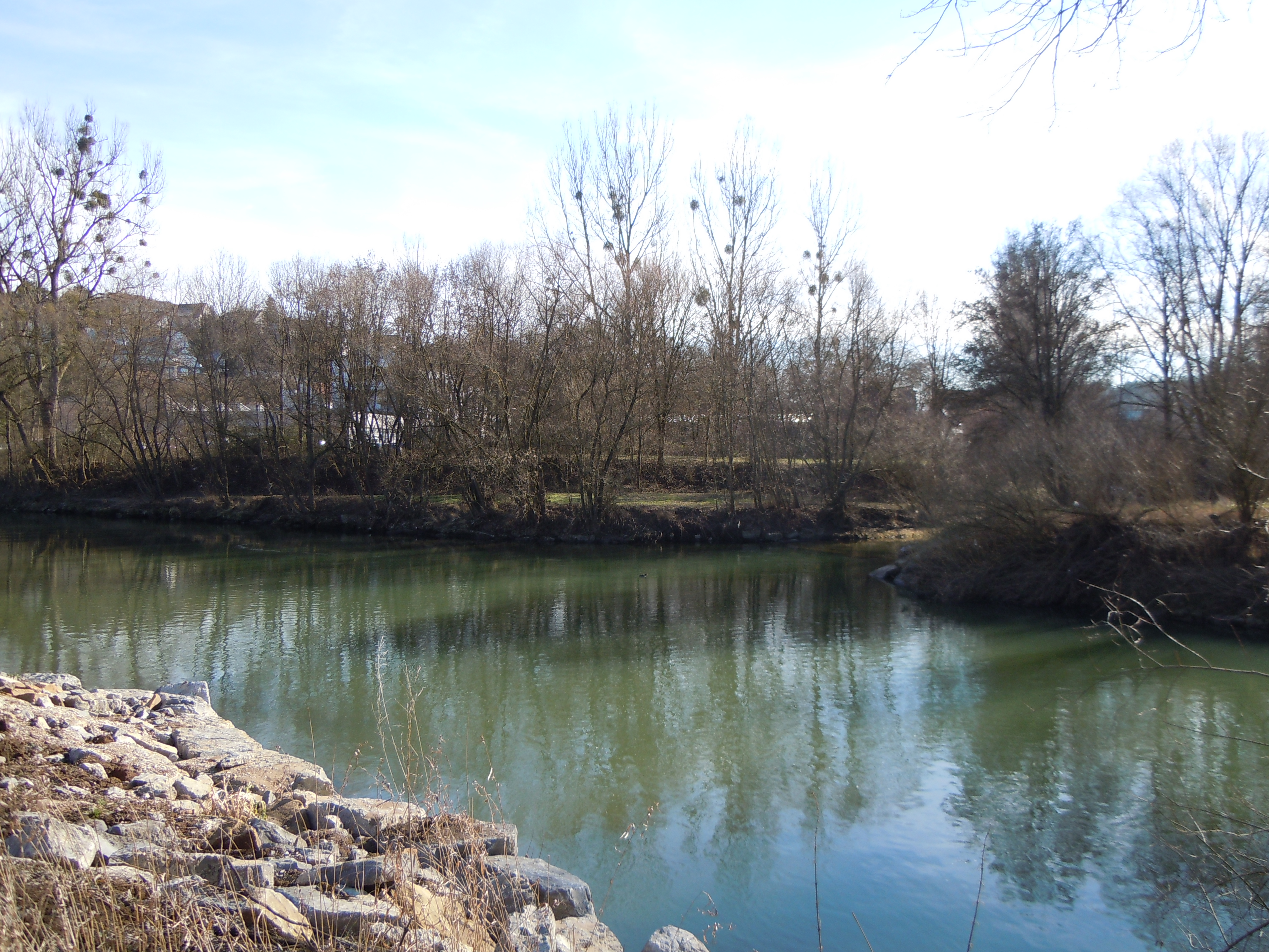 Mündung der Echaz in den Neckar bei Kirchentellinsfurt